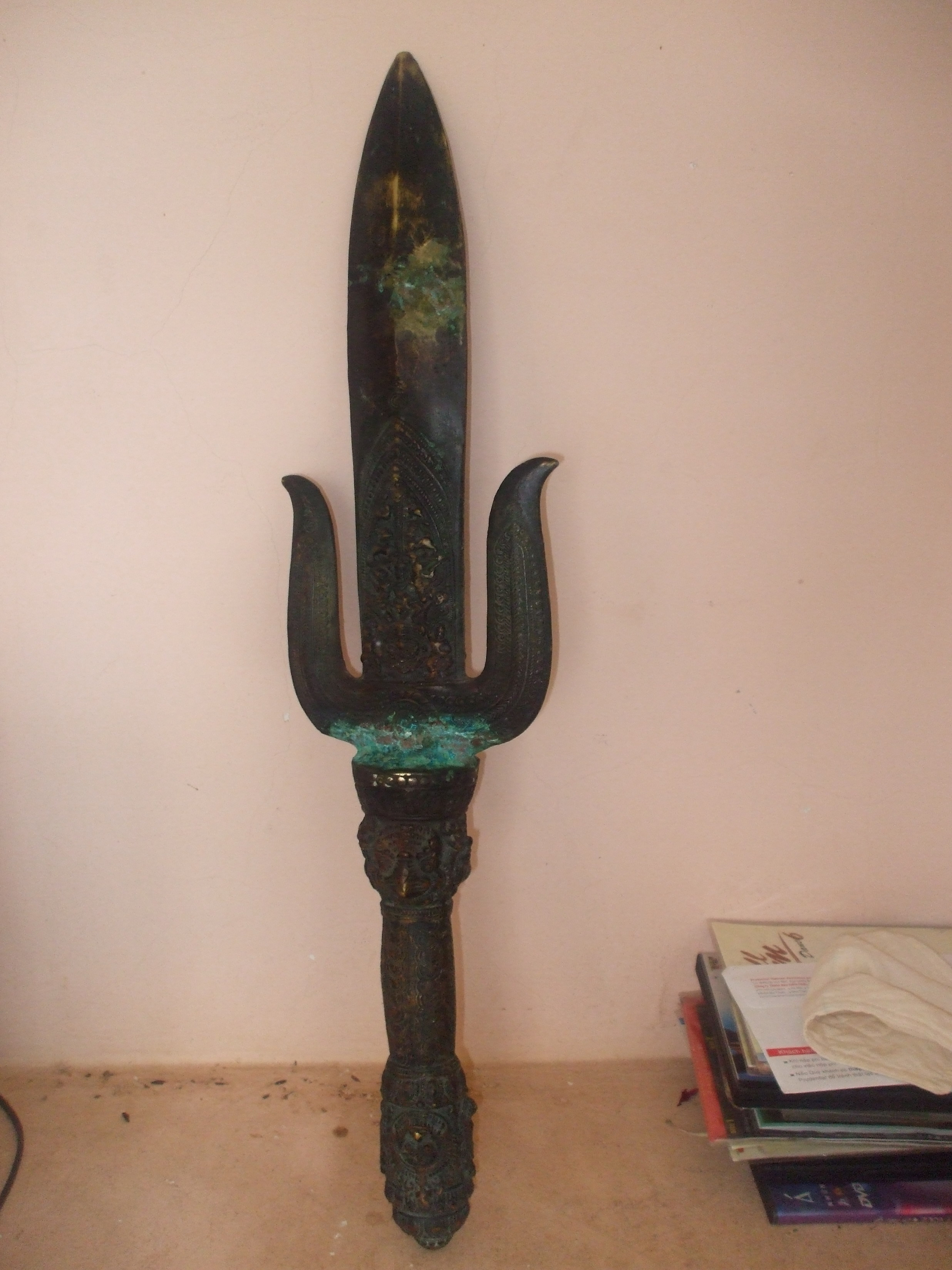 Thanh kiếm gãy của một võ tướng Xiêm tại nhà một người sưu tầm đồ cổ ở Tp. rạch Giá, Kiên Giang, Việt Nam.